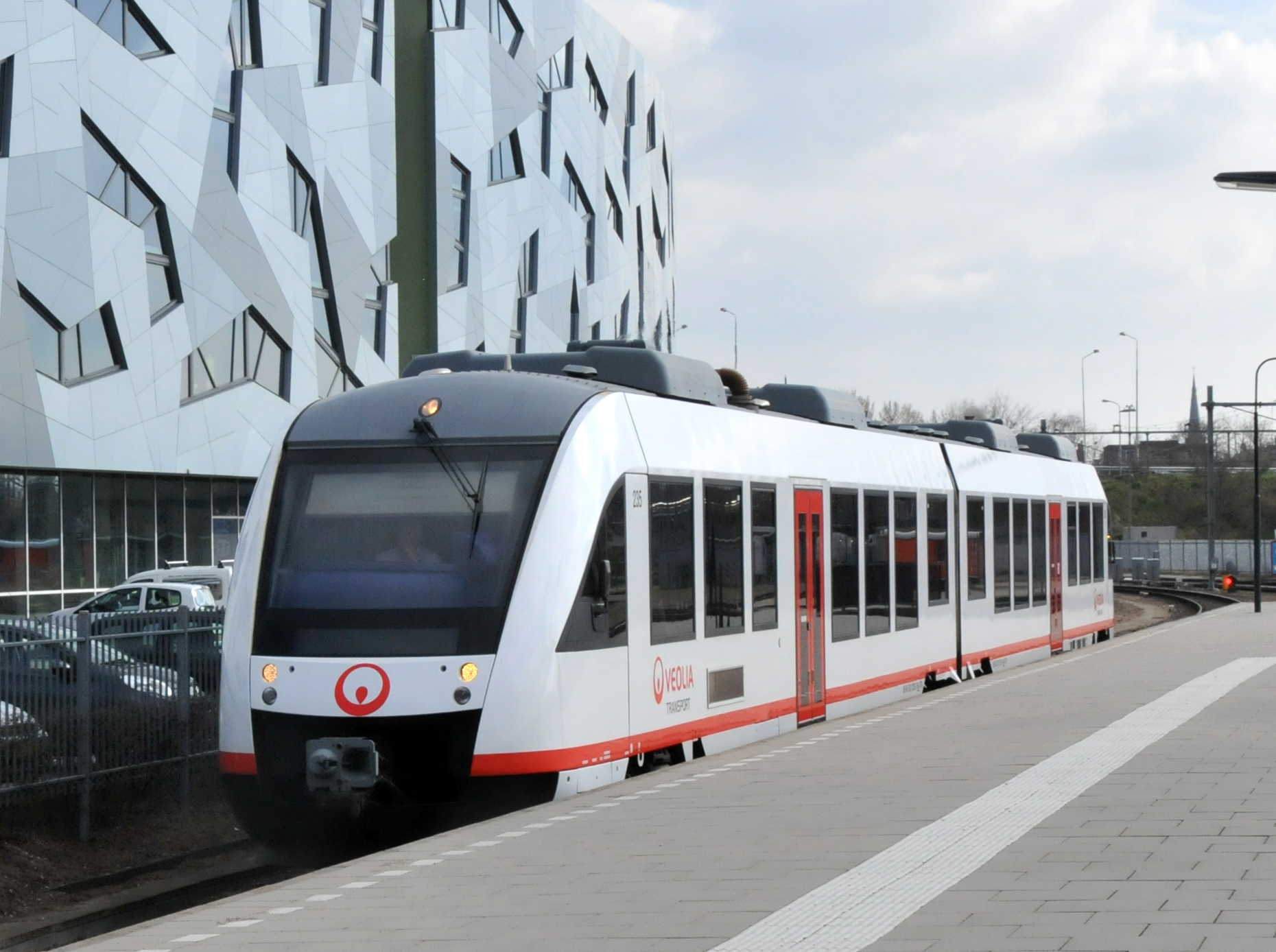 Veolia Transport Nederland treinstel 235 van het type Alstom Coradia LINT te Nijmegen.